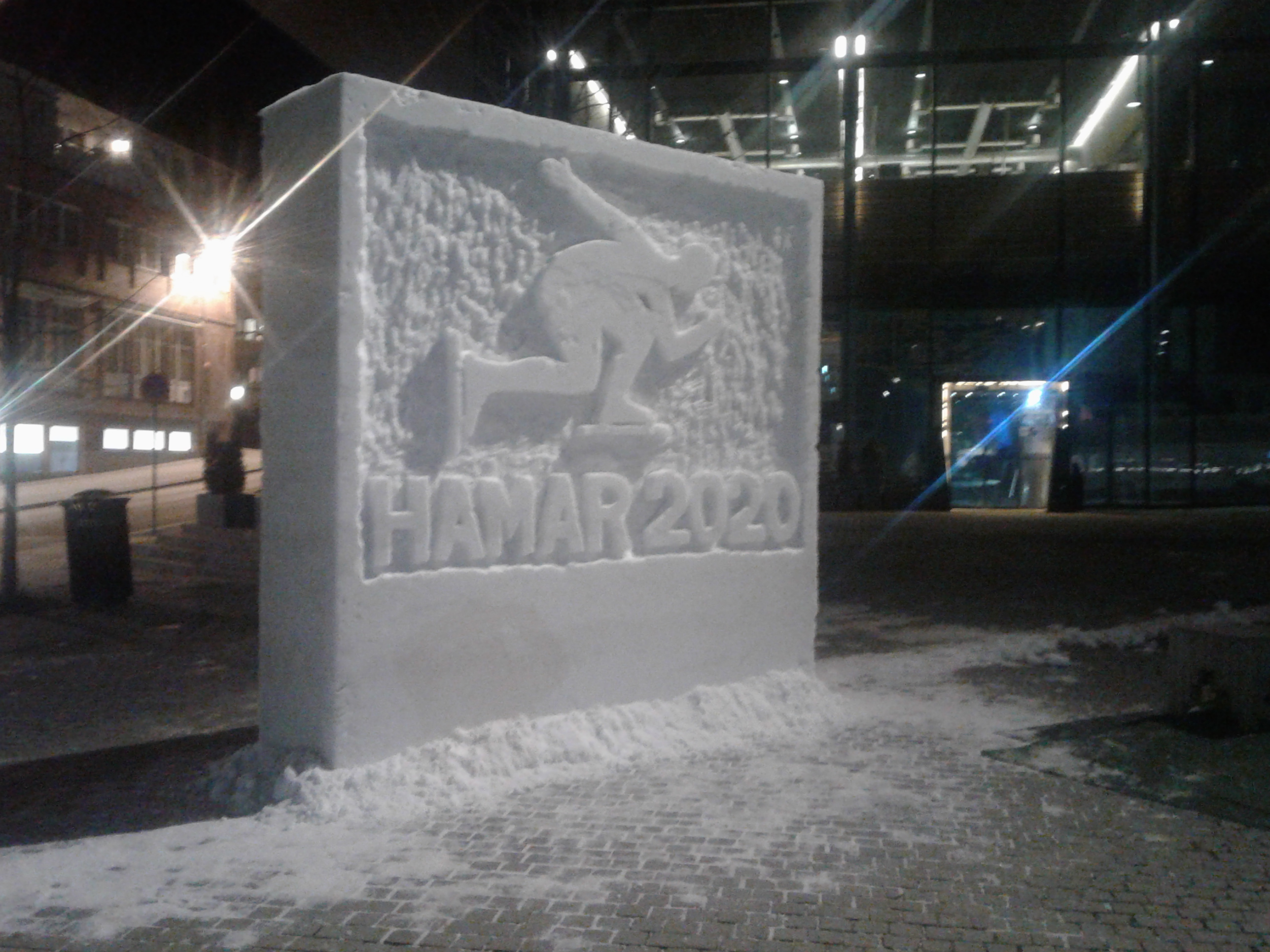 is/snøskulptur på stortorvet i Hamar for skøyte-VM 2020